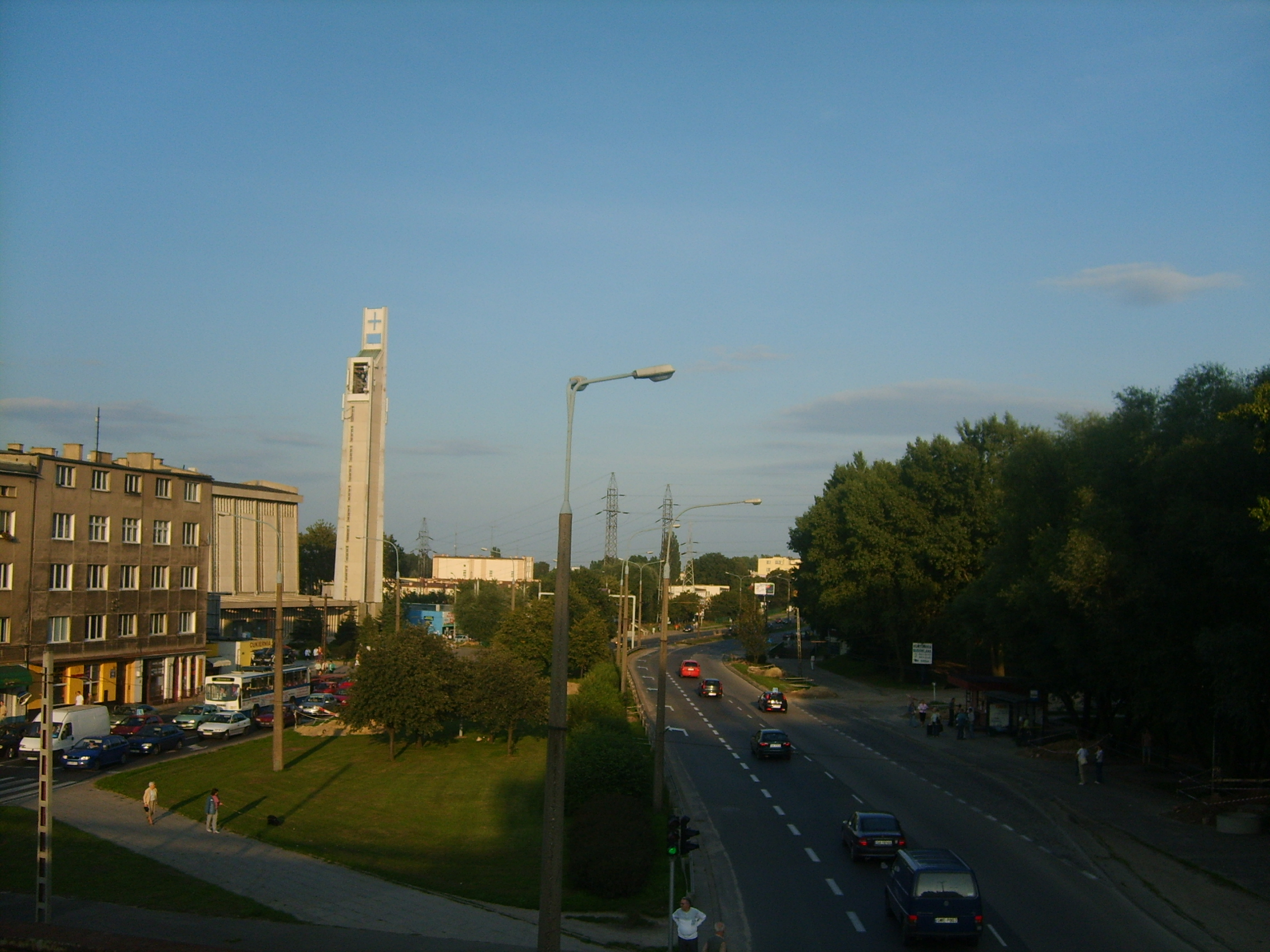 Ulica Morska w dzielnicy Leszczynki.